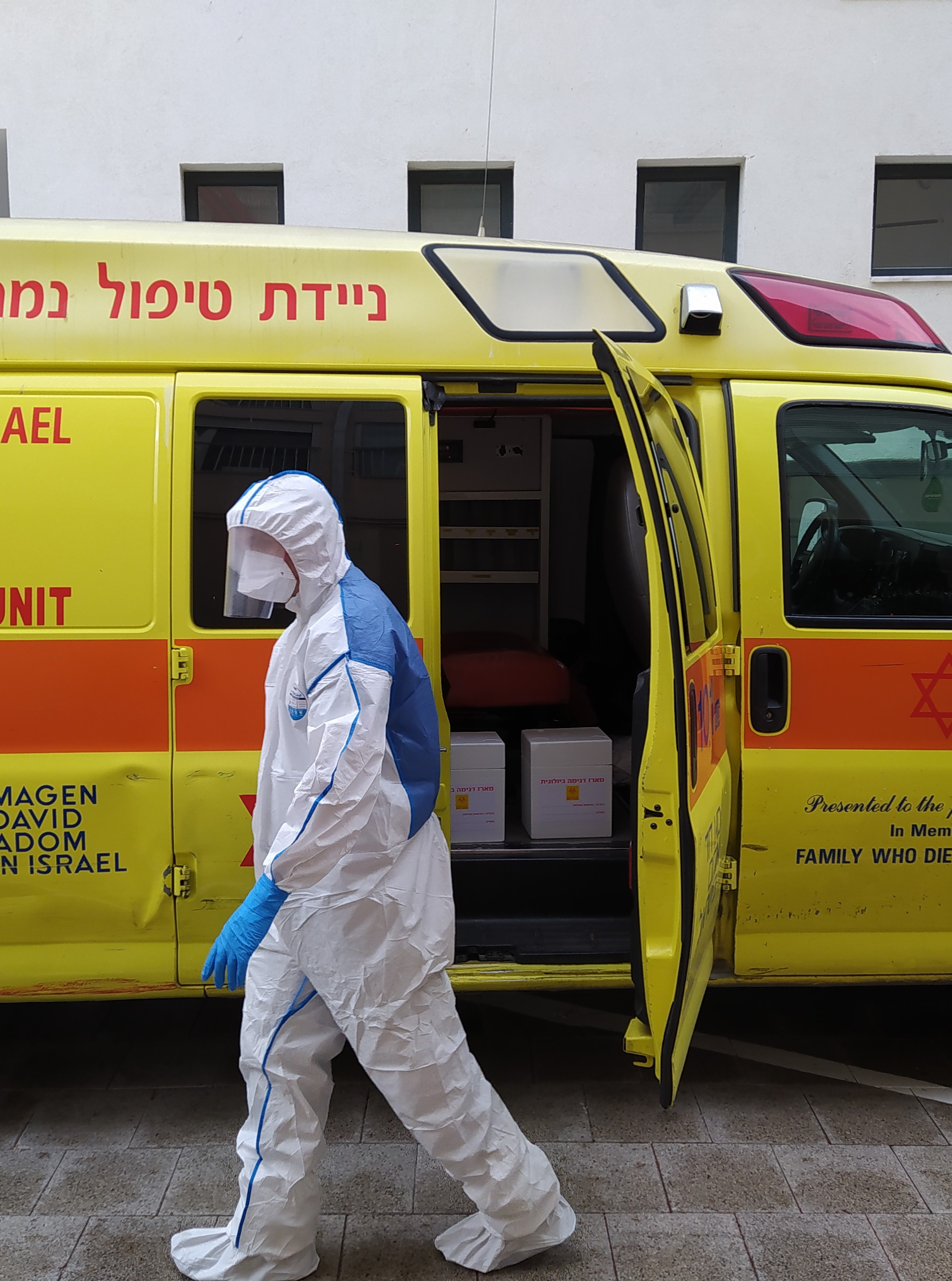 עובד ממוגן של מגן דוד אדום, רחוב אבן גבירול, תל אביב-יפו